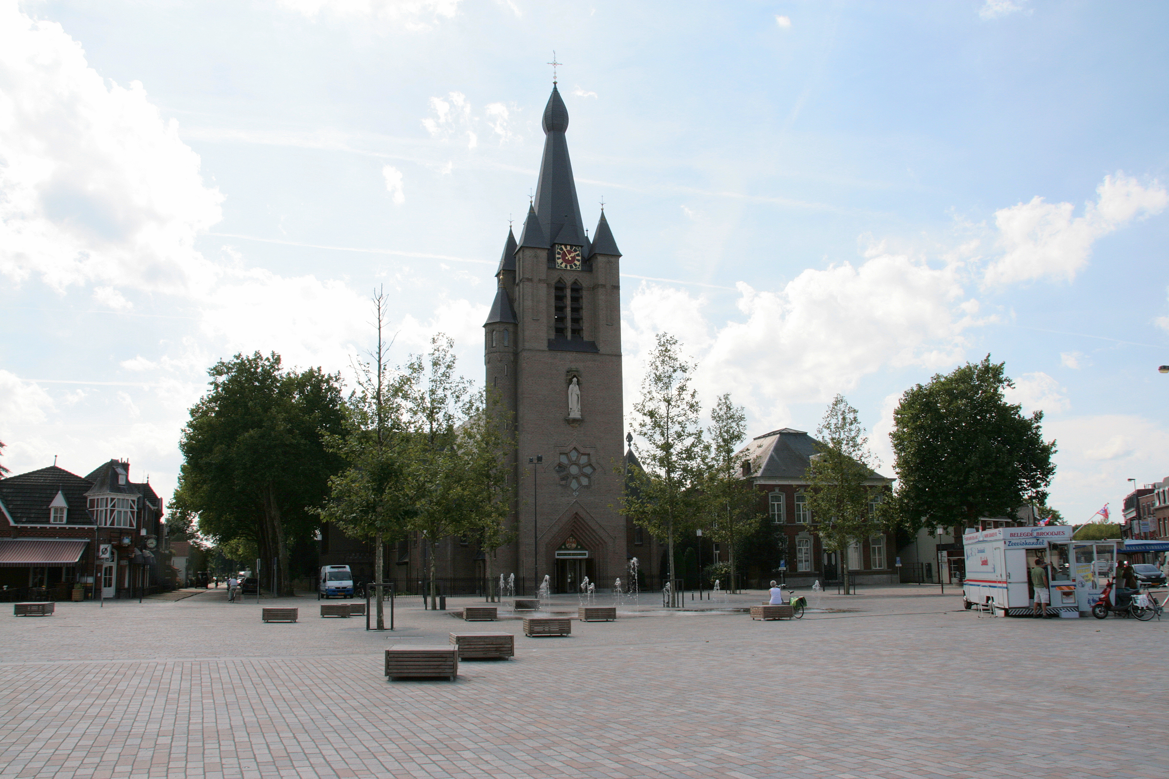 Deze neogotische kerk aan de Markt stamt oorspronkelijk uit 1860 maar werd, door de snelle bevolkingsgroei, te klein en is daarom in 1927 afgebroken, op de toren na. In 1929 werd de vernieuwde kerk ingewijd. De bouwmeester was Jan Stuyt. De kerk bevat mooie gebrandschilderde ramen van Luc van Hoek, terwijl daarnaast in de Mariakapel ramen zijn van Jos Leurs uit 1992.